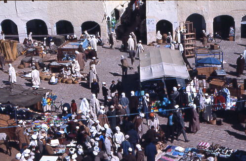 Marché à Ghardaïa, Algérie